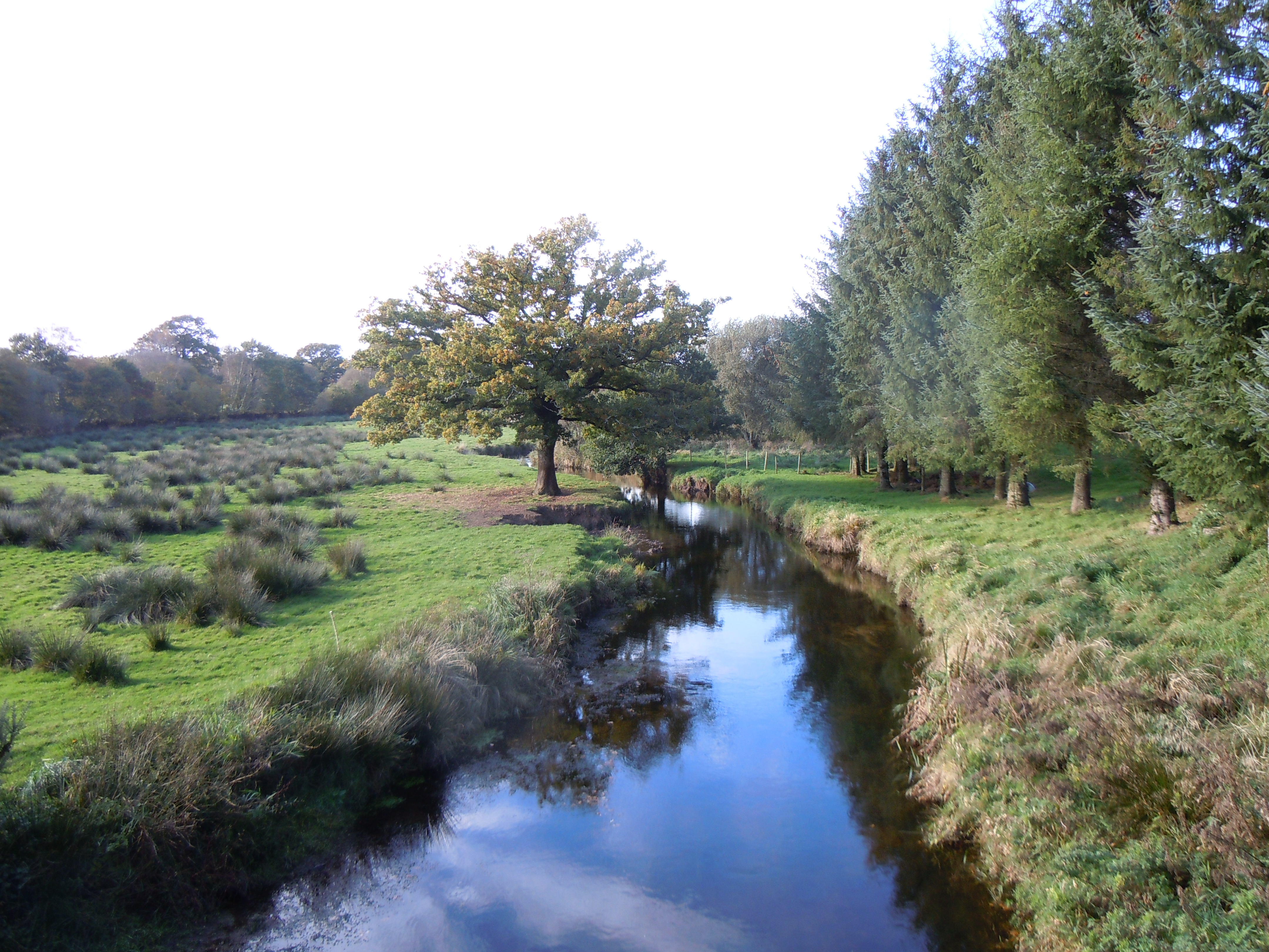 vue prise depuis le Pont Penvern à Scaër (Morbihan) de la rivière Isole